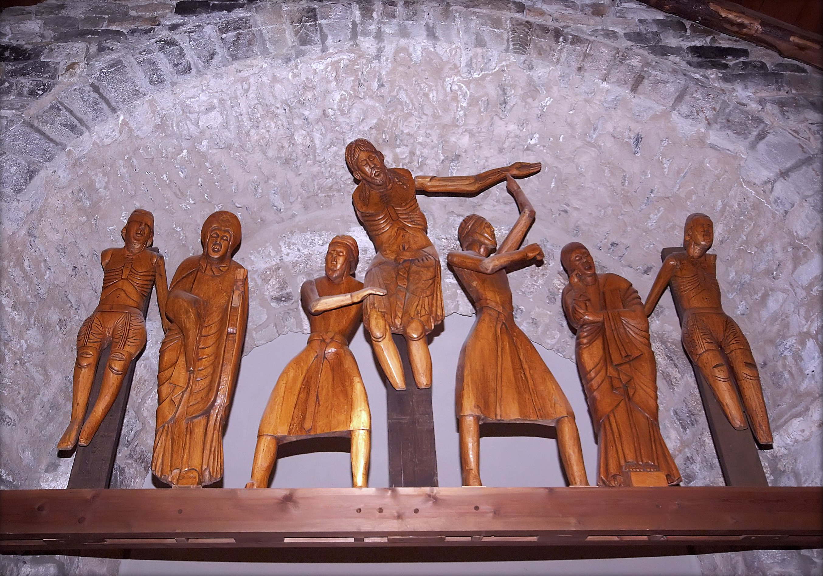 Església de Santa Eulàlia d'Erill-la-vall (La Vall de Boí)